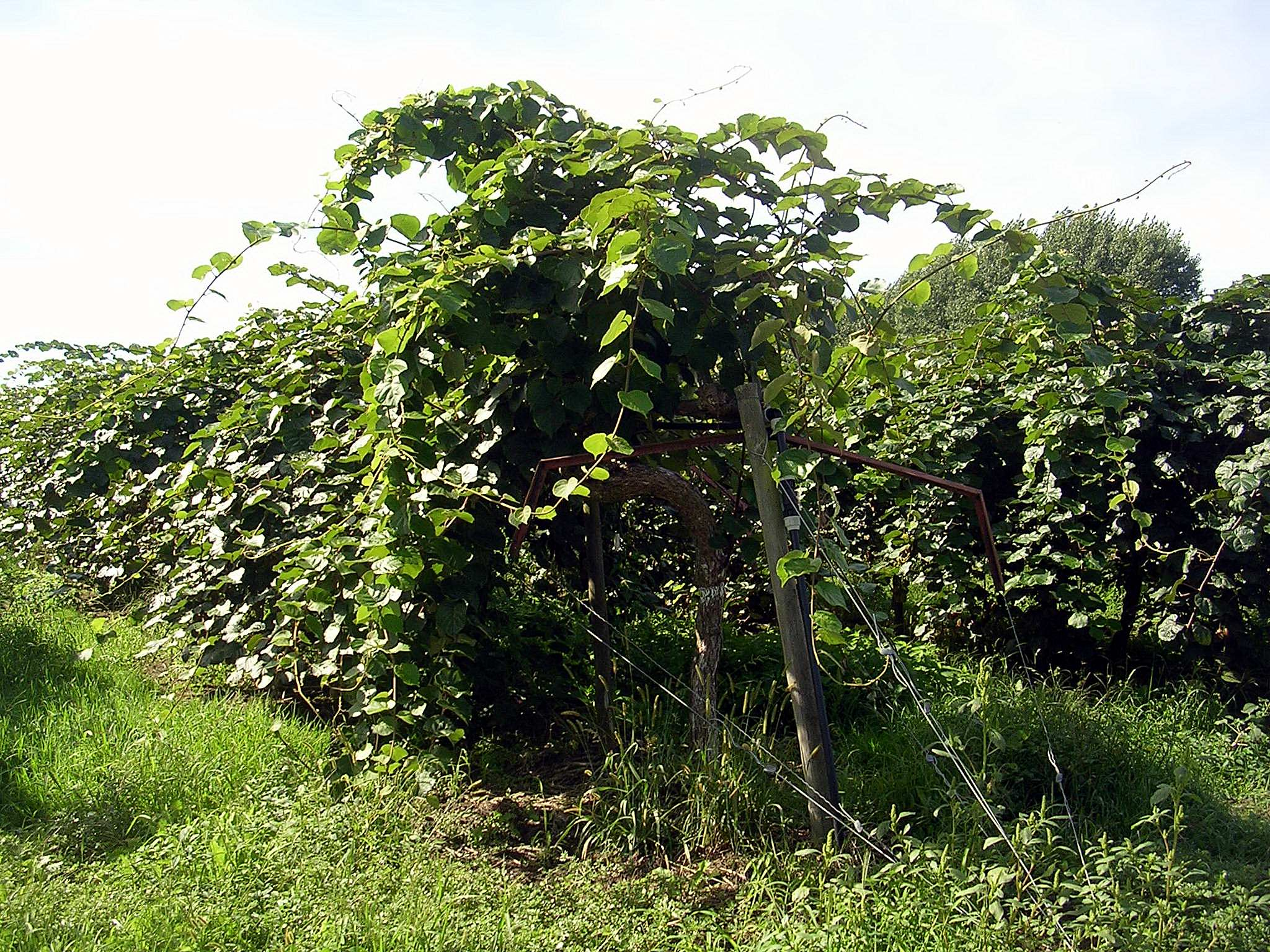 Kiwi de l'Adour à Aurice, dans le département français des Landes